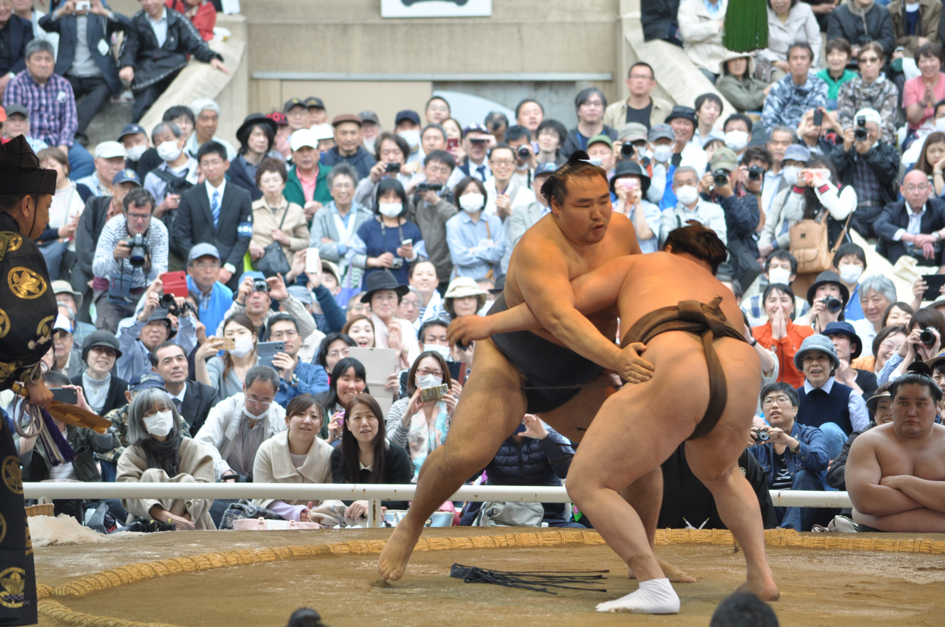 鶴竜力三郎